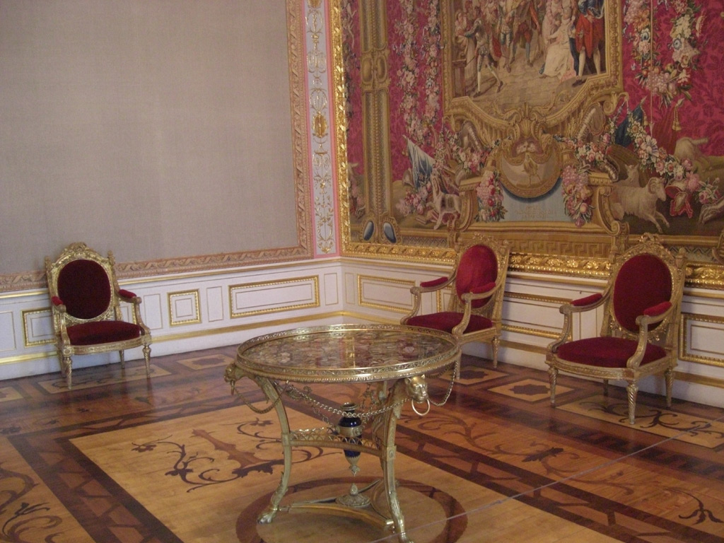 Малиновая гостиная в Большом Гатчинском дворце